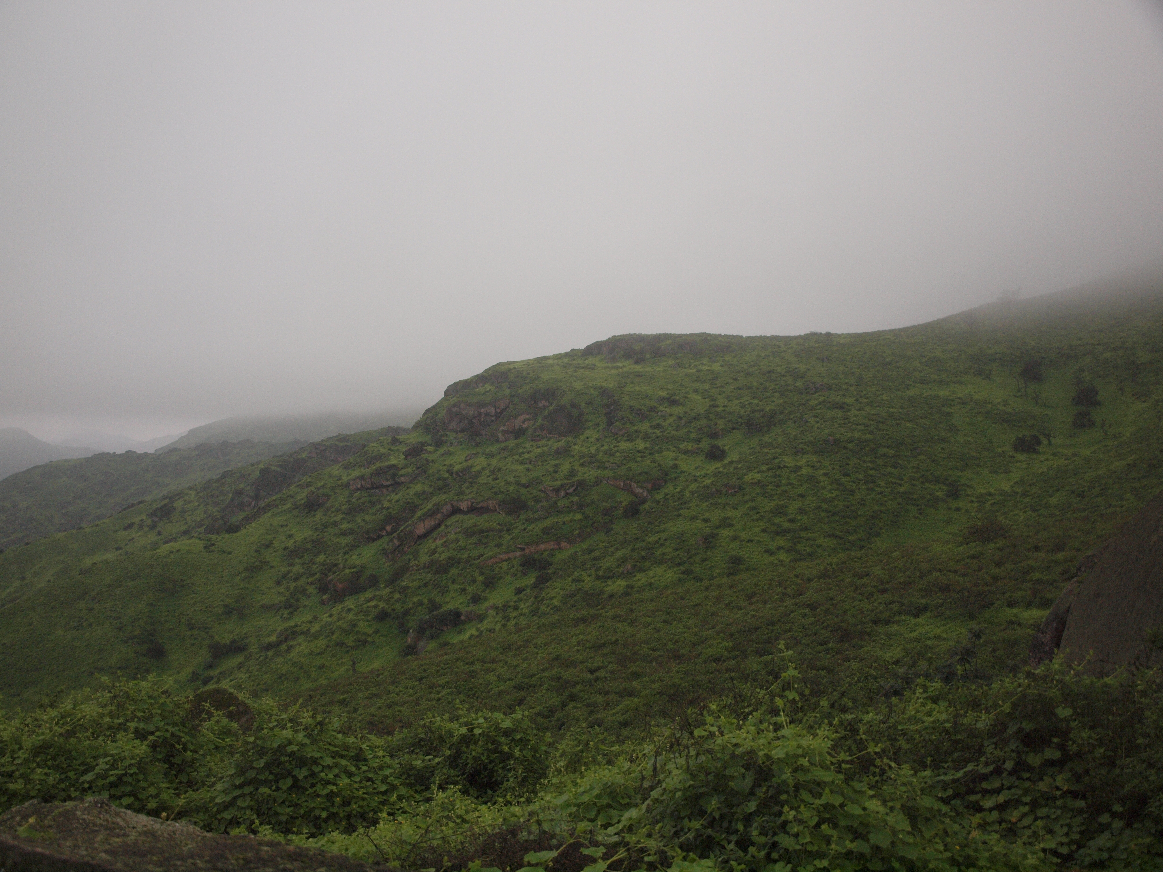 Vista de la RN Lomas de Lachay, Lima, Perú